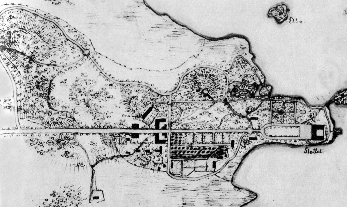 Tullgarns slott och park enligt en uppmätning från 1844